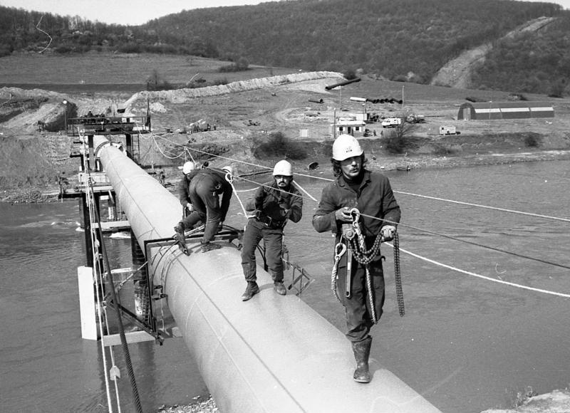 UdSSR, DDR-Monteure an Gastrasse ADN-ZB/Häßler/27.4.83/UdSSR Dnestr-"Brücke" / In luftiger Höhe montieren Mitglieder des Jugendkollektivs "Georgi Dimitroff" vom VEB IMO (Industriemontage) Leipzig Spannseile zur Stabilisierung der Dnestr-"Brücke". - Die Montage- und Baukollektive am DDR-Abschnitt der Erdgastrasse Urengoi-Ushgorod im ukrainischen Gebiet Iwano-Frankowsk ringen darum, die Dnestrquerung zweieinhalb Monate früher als geplant zu realisieren. Sechs Stützen mit einer Höhe bis zu 12 Meter tragen den 225 Meter langen Rohrstrang, der den bis zu 200 Meter breiten und sechs Meter tiefen Dnestr in der Nähe von Gorodenko überspannen wird.